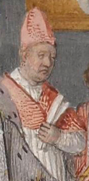 Représentation probable de Guy Bernard, évêque de Langres. Détail du frontispice des Statuts de l'ordre de Saint-Michel, exemplaire destiné à Louis XI.